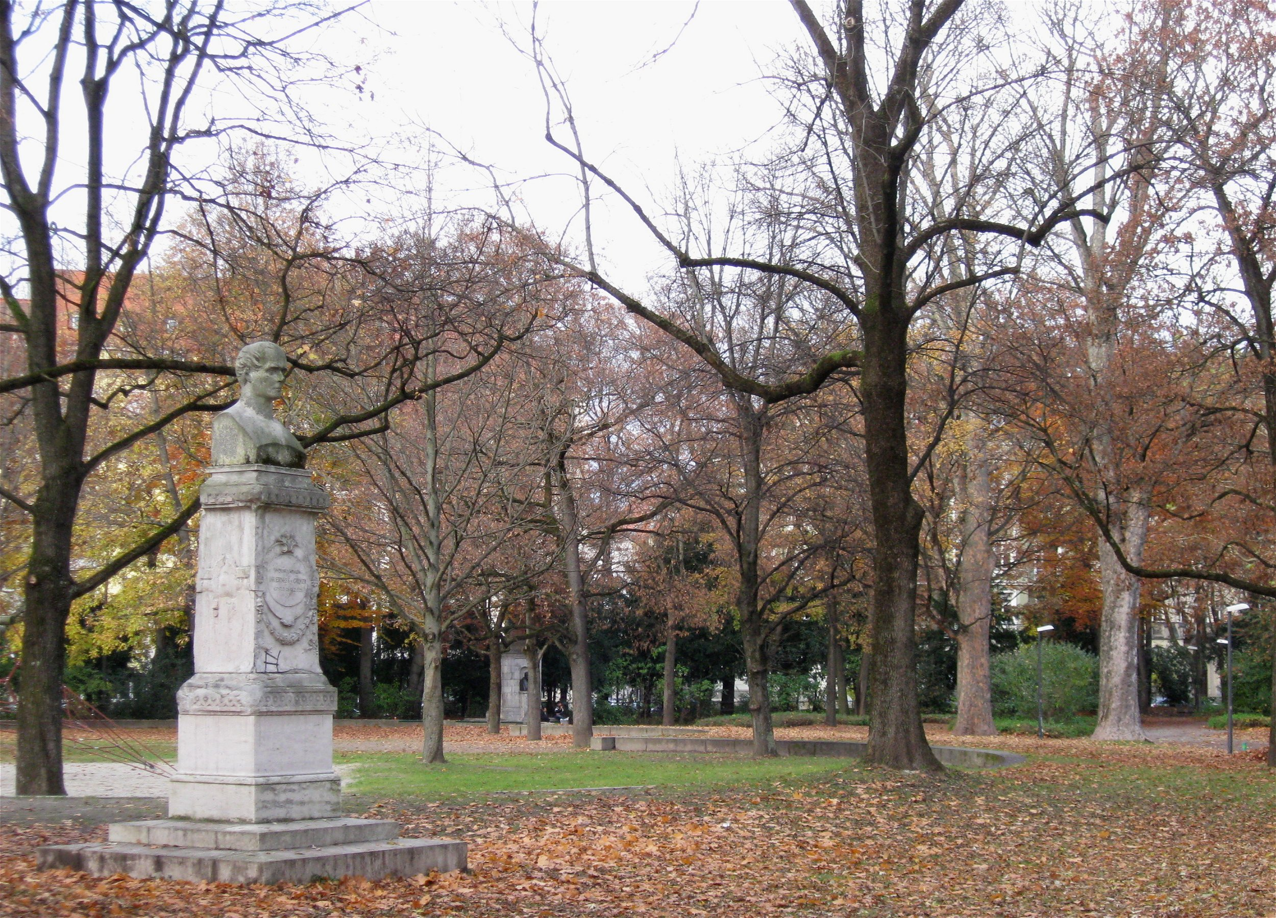 Nussbaumpark, München